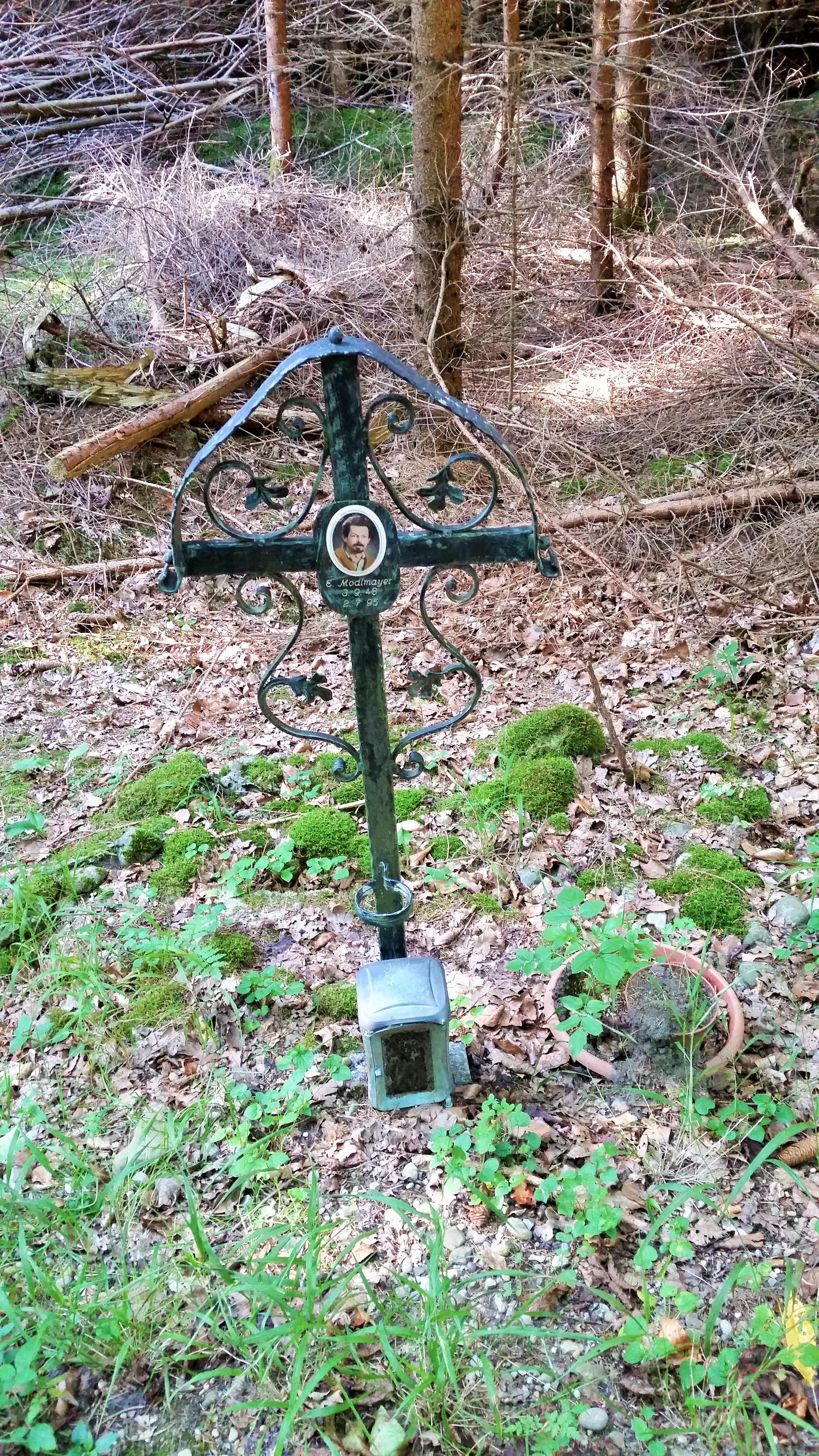 Feldkreuz bei der Keltenschanze erinnert an Flugzeugabsturz von 1995 bei dem vier Menschen starben, 2020